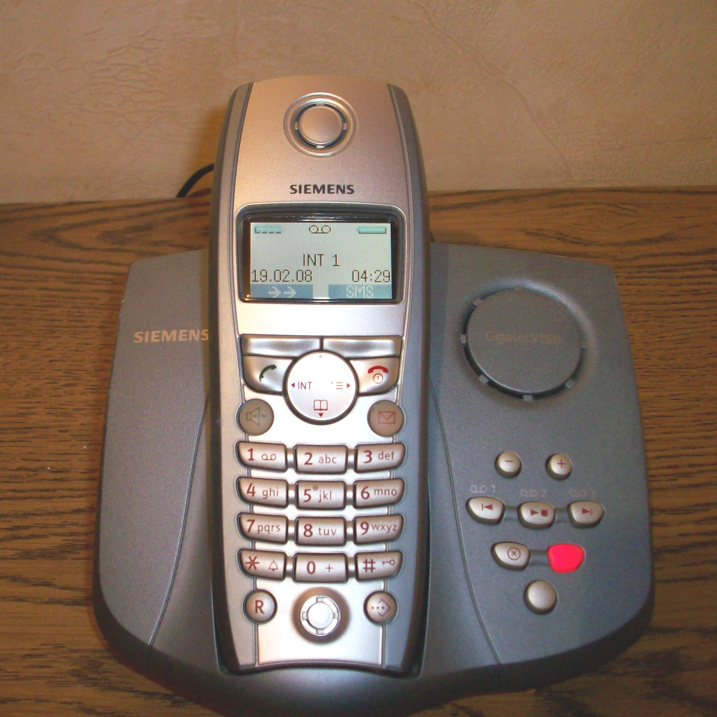 Siemens GIGASET S150 See also / siehe auch Image:Siemens GIGASET S150 05.jpg